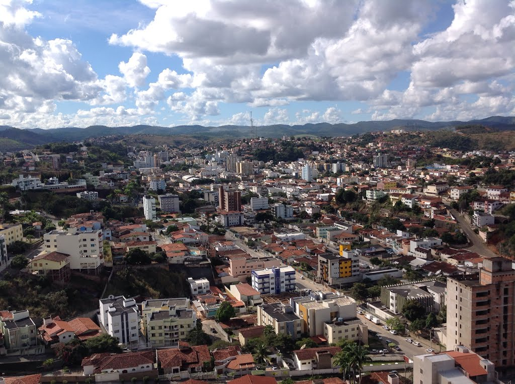 Vista parcial e panoramica de Teófilo Otoni MG. A foto foi tirada em Julho de 2014.